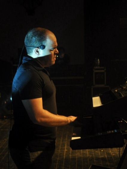 Ronald Fonseca, pianista, tecladista e produtor do Trazendo a Arca. Foto de Roberta Chimango